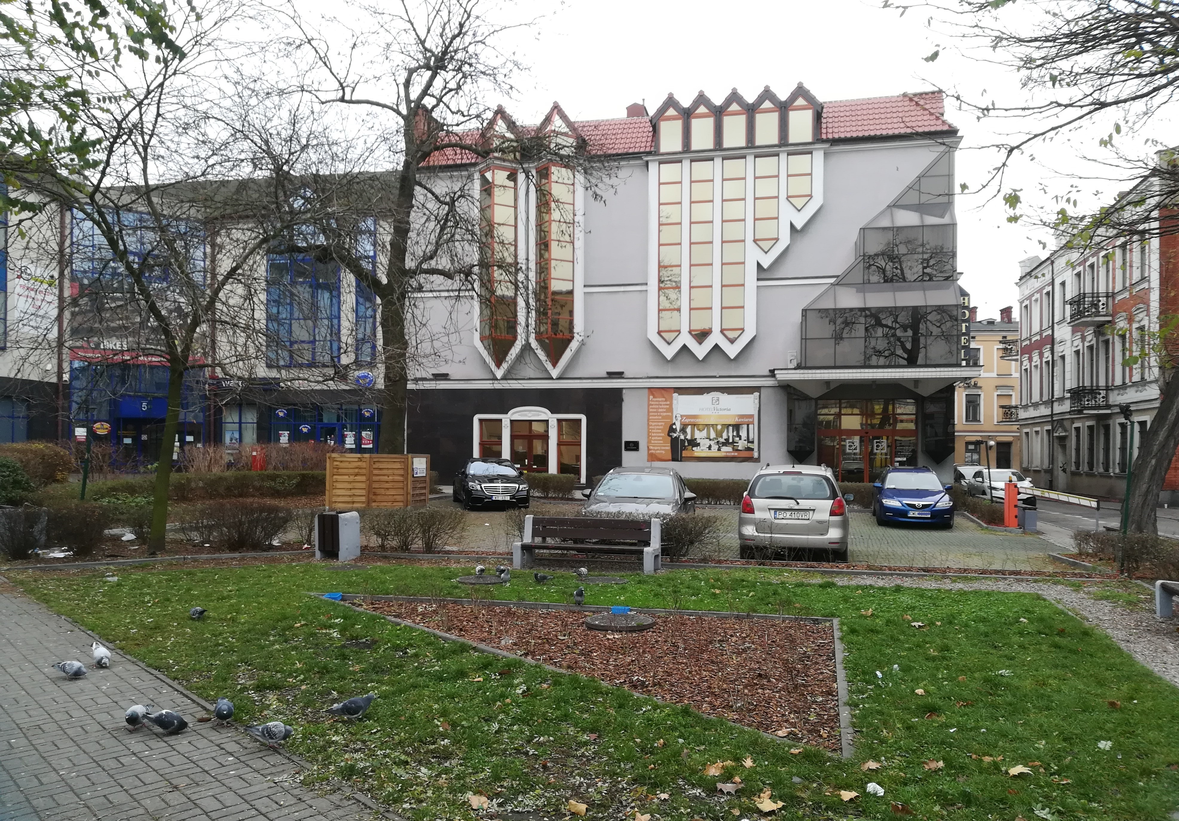 Hotel Victoria we Włocławku.